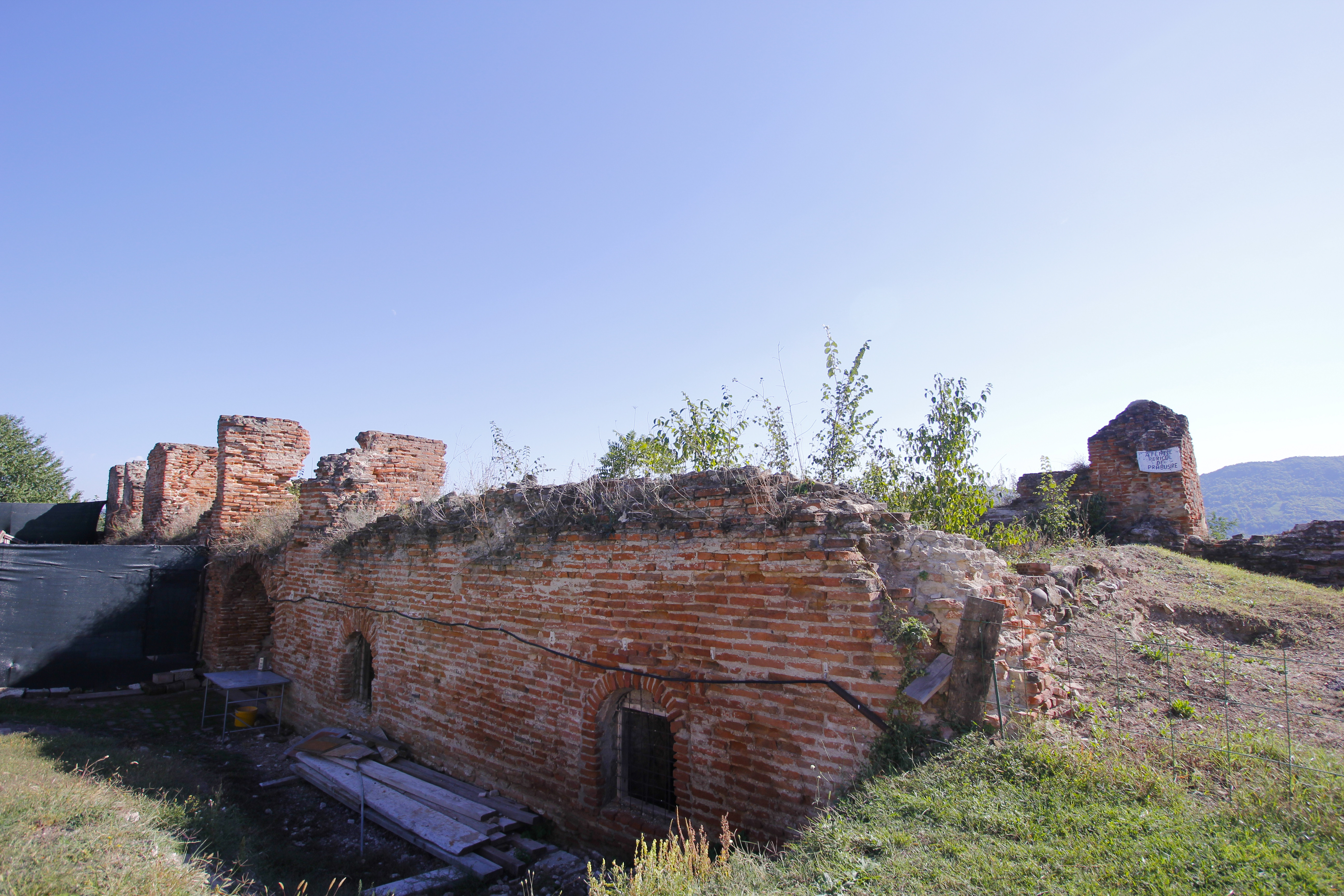 Necropolă 03